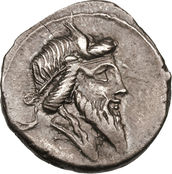 Il dio romano Mutunus Tutunus. Denario coniato da Quinto Tizio.